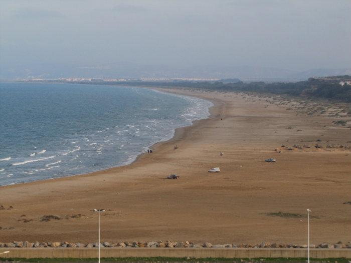 Vista de la playa situada al este del cabo de Agua (Marruecos)